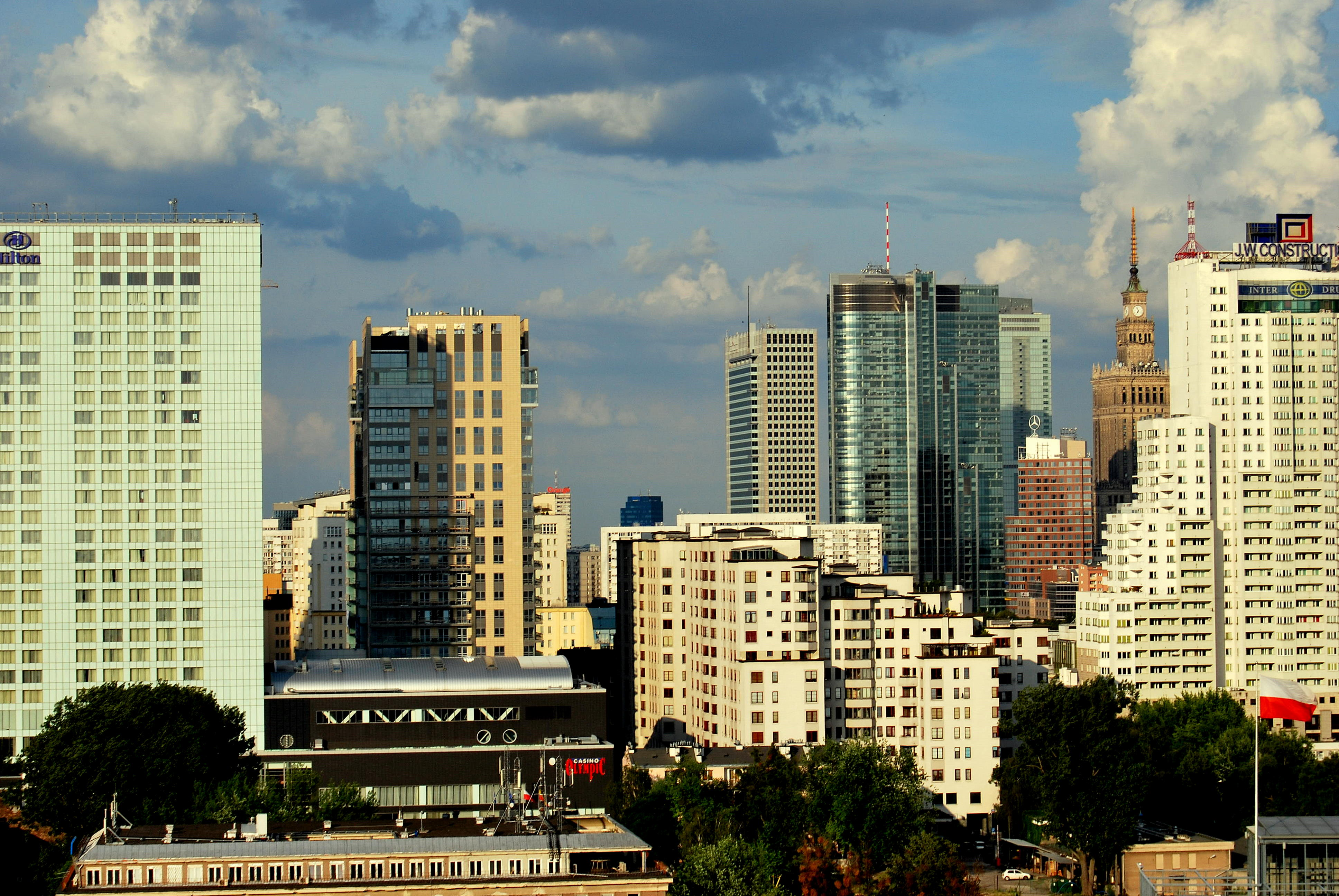 Panorama Warszawy. Widok z dachu starej fabryki rtęci im. Róży Luksemburg